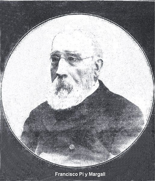 Ritratto di Francisco Pi y Margall